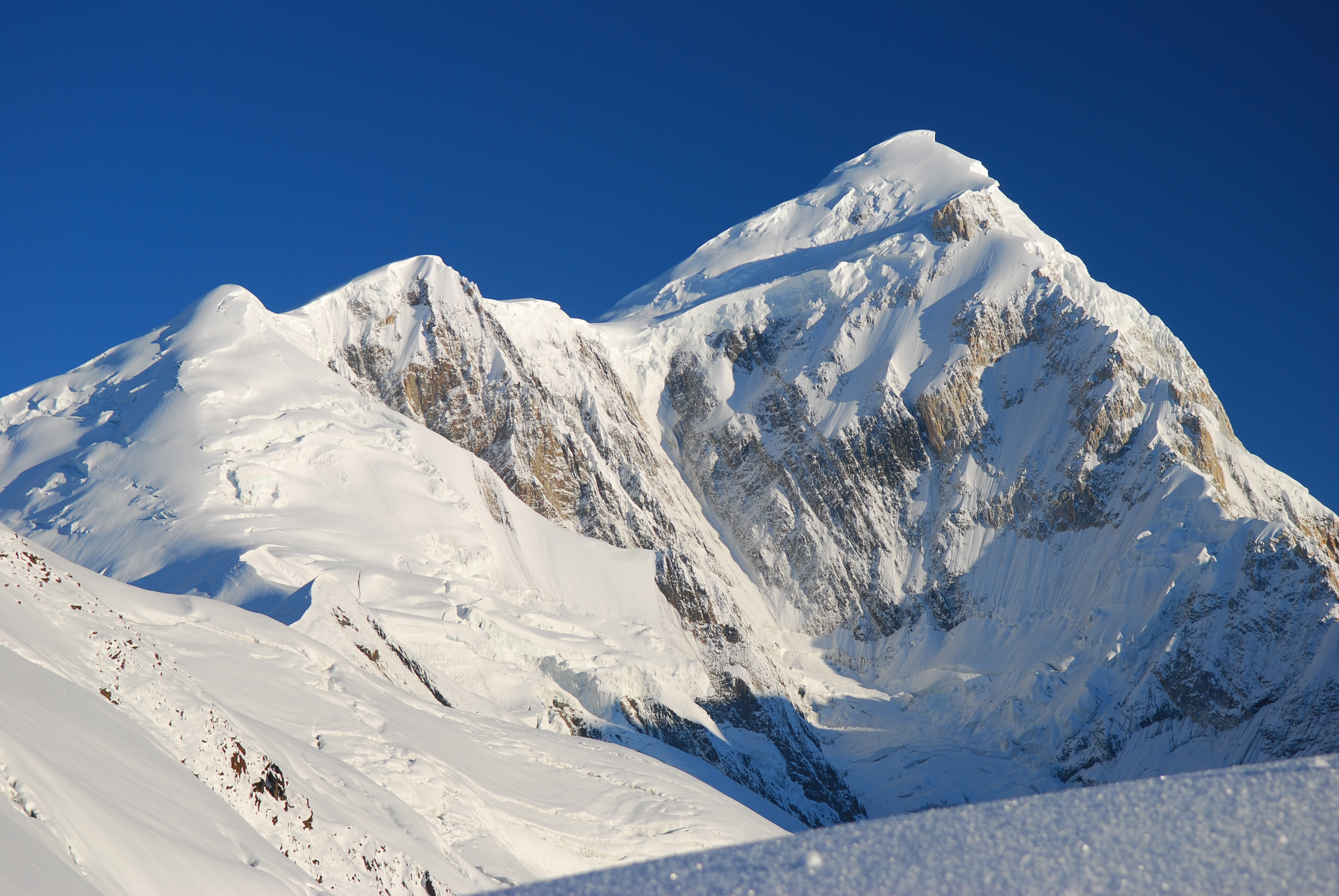 Spantik vom Süd-Ost-Grat